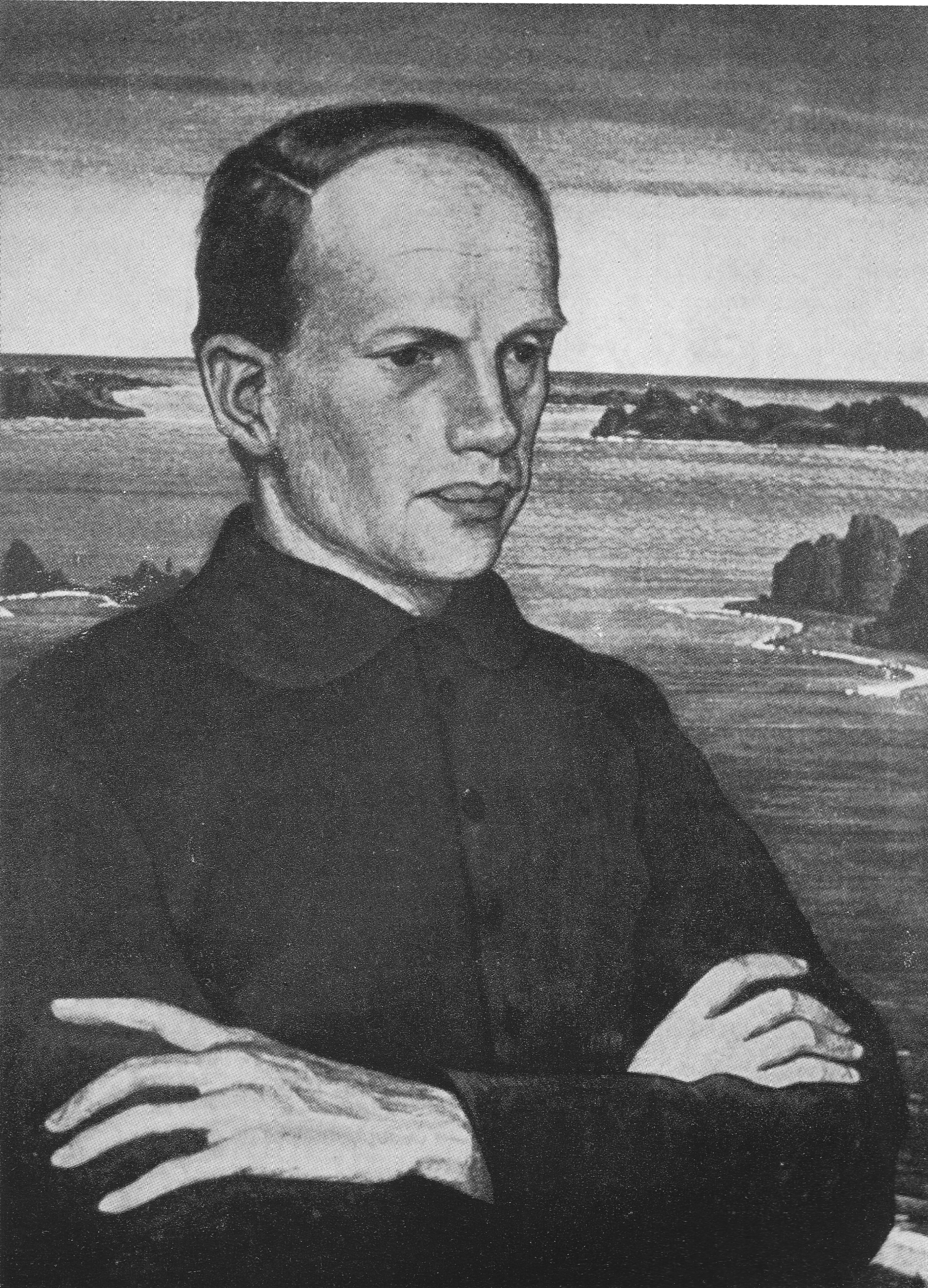 Albrecht Schaeffer (1885-1950), Bildnis von Herbert Reyl